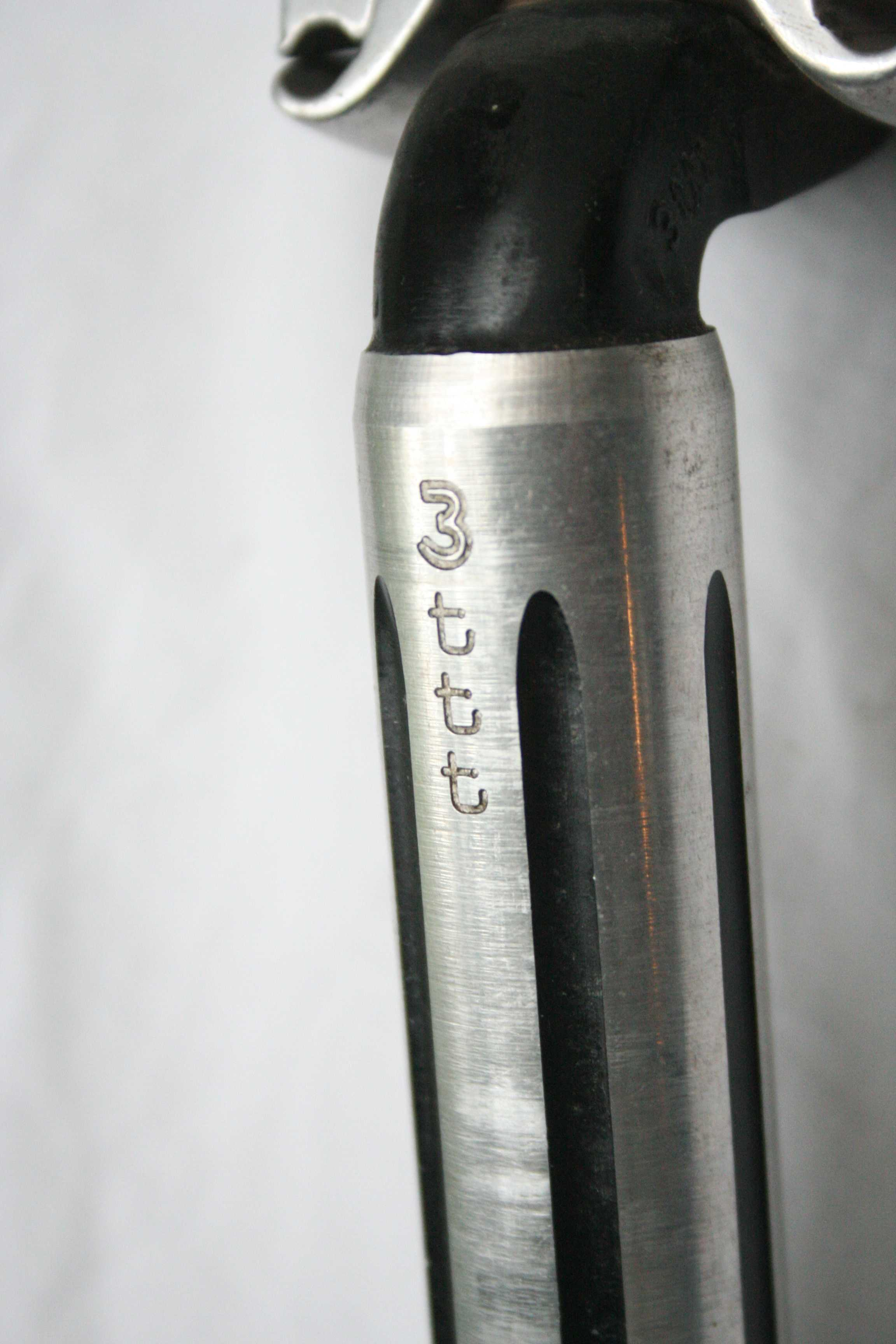 3ttt Logo auf eienr Sattelstütze